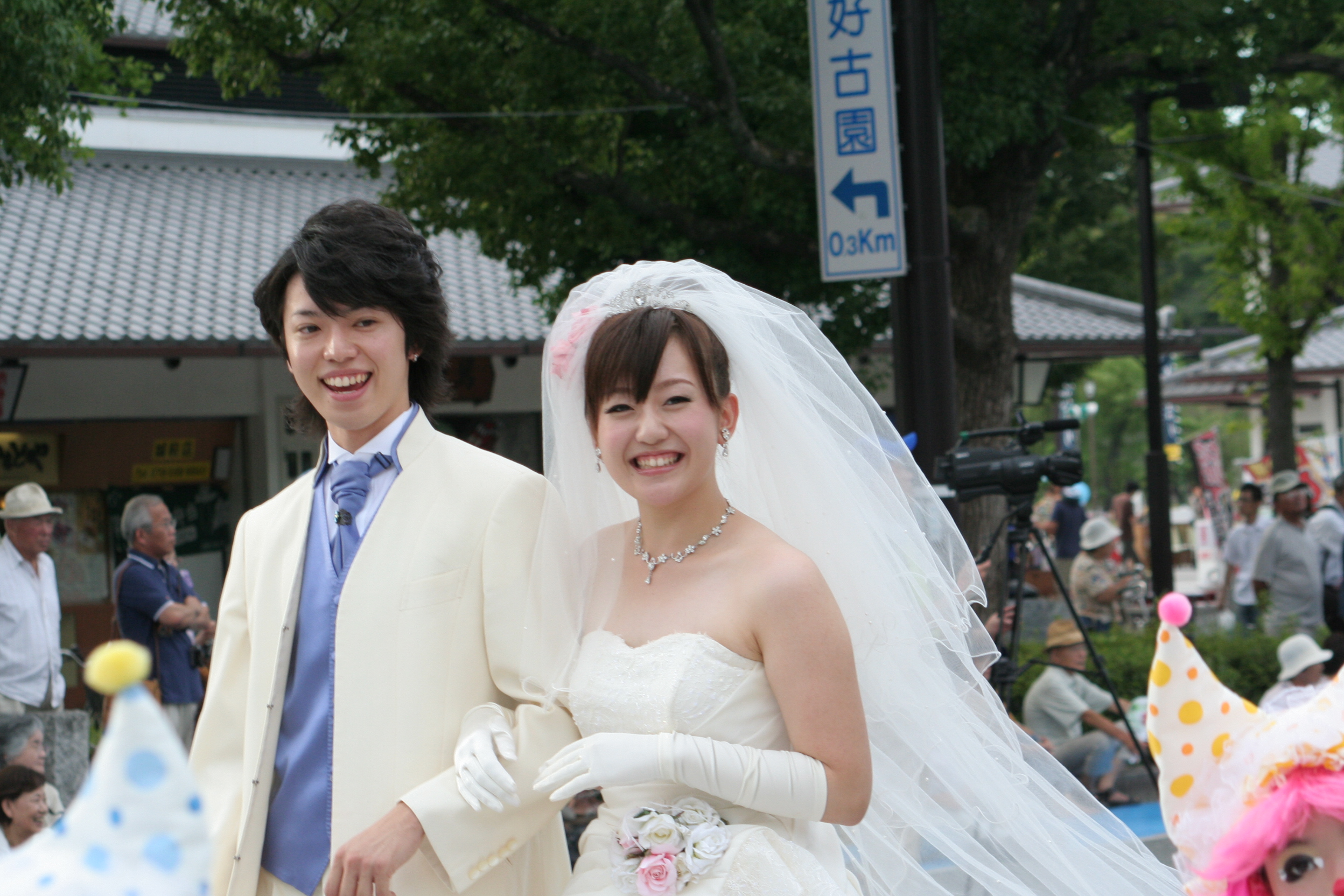 姫路お城祭り。2010年8月6日から9日の3日間に兵庫県姫路市にて開催された姫路の祭り。2日目の大手前公園および大手前通りでのパレードの模様。